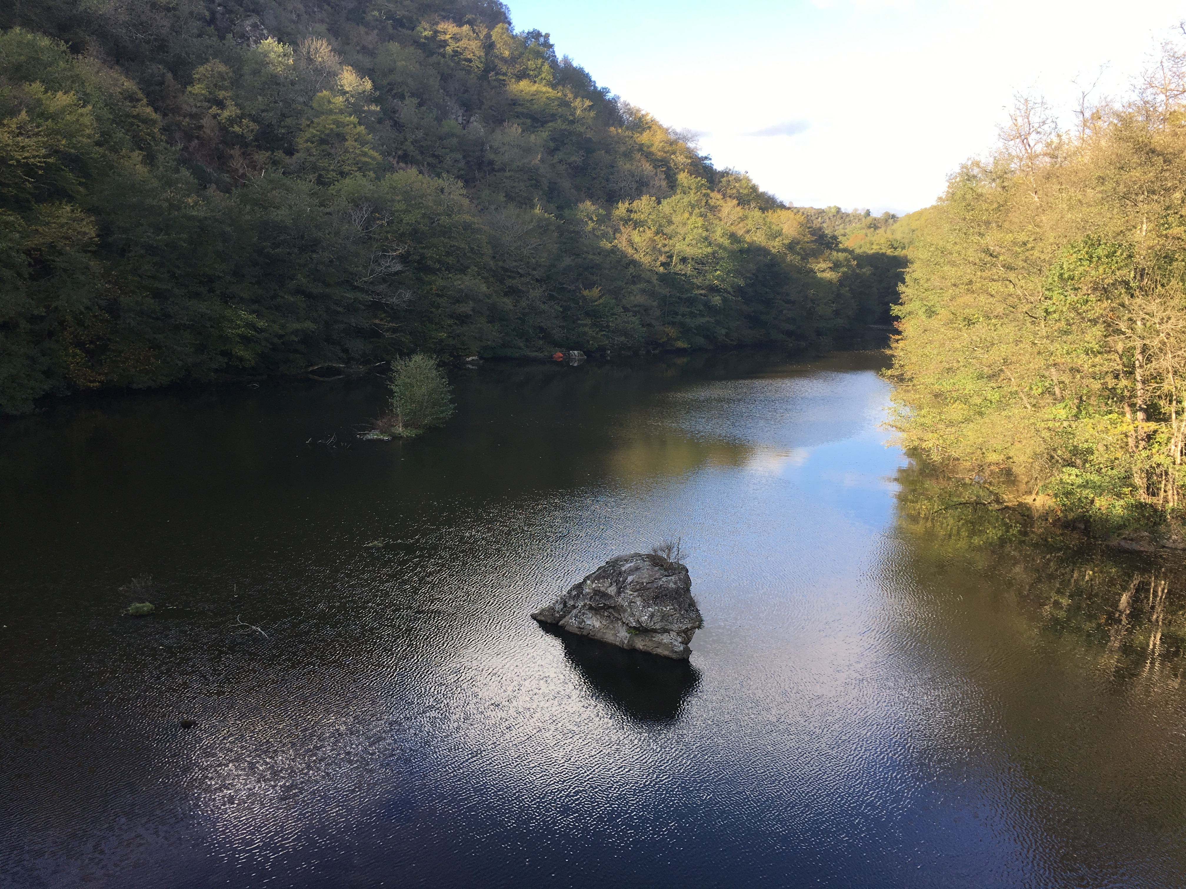 La rivière Creuse en direction de Badecon-le-Pin (36), au Pont Noir.